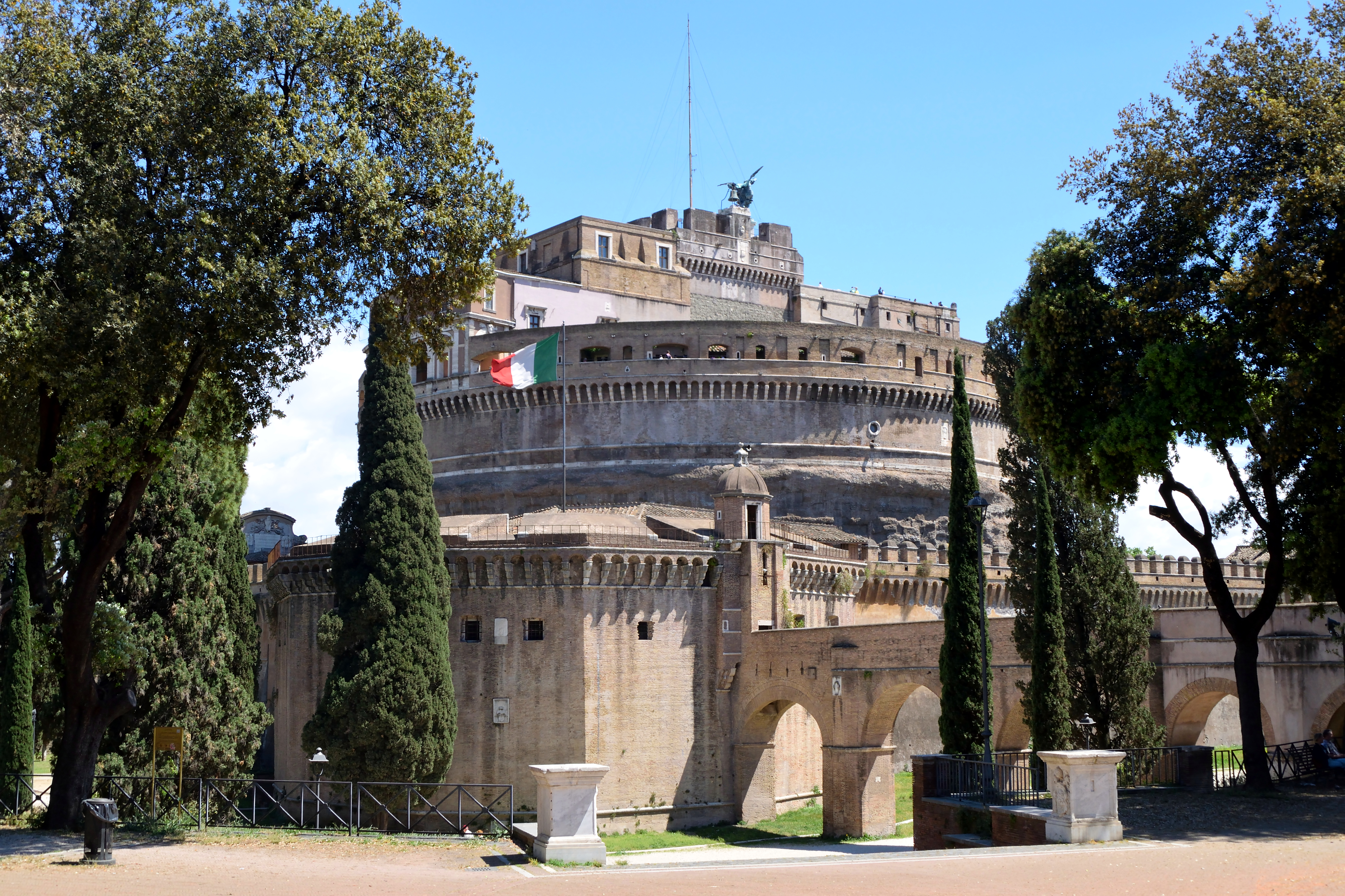 Die Engelsburg mit der anschließenden Verbindungsmauer (Passetto), die zum Vatikan führt